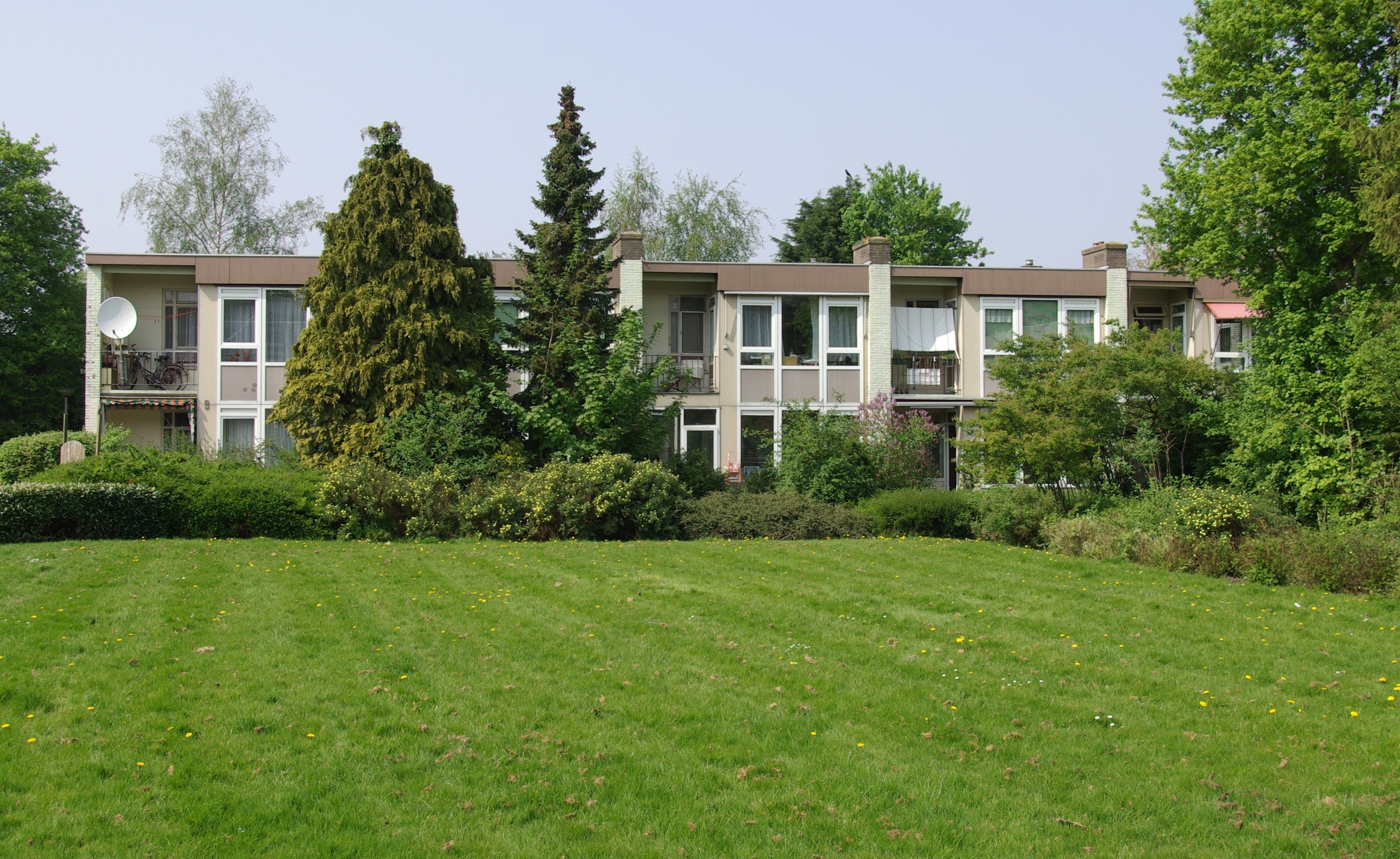 De wijk Jeruzalem in Amsterdam-Oost. De stedenbouwkundigen en architecten Cornelis van Eesteren, J.H. Mulder, B. Merkelbach, Ch.J.F. Karsten, Piet Elling en M. Stam zijn de ontwerpers. De woningen zijn gebouwd tussen 1950 en 1954. Na voordracht in 2007 via de lijst van rijksmonumenten uit de periode 1940-1958, opgesteld door Ronald Plasterk, werd de wijk Frankendaal/Jeruzalem erkend als rijksmonument.